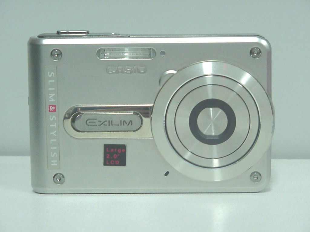 Appareil photographique numérique Casio Exilim EX-S100 - Vue de face